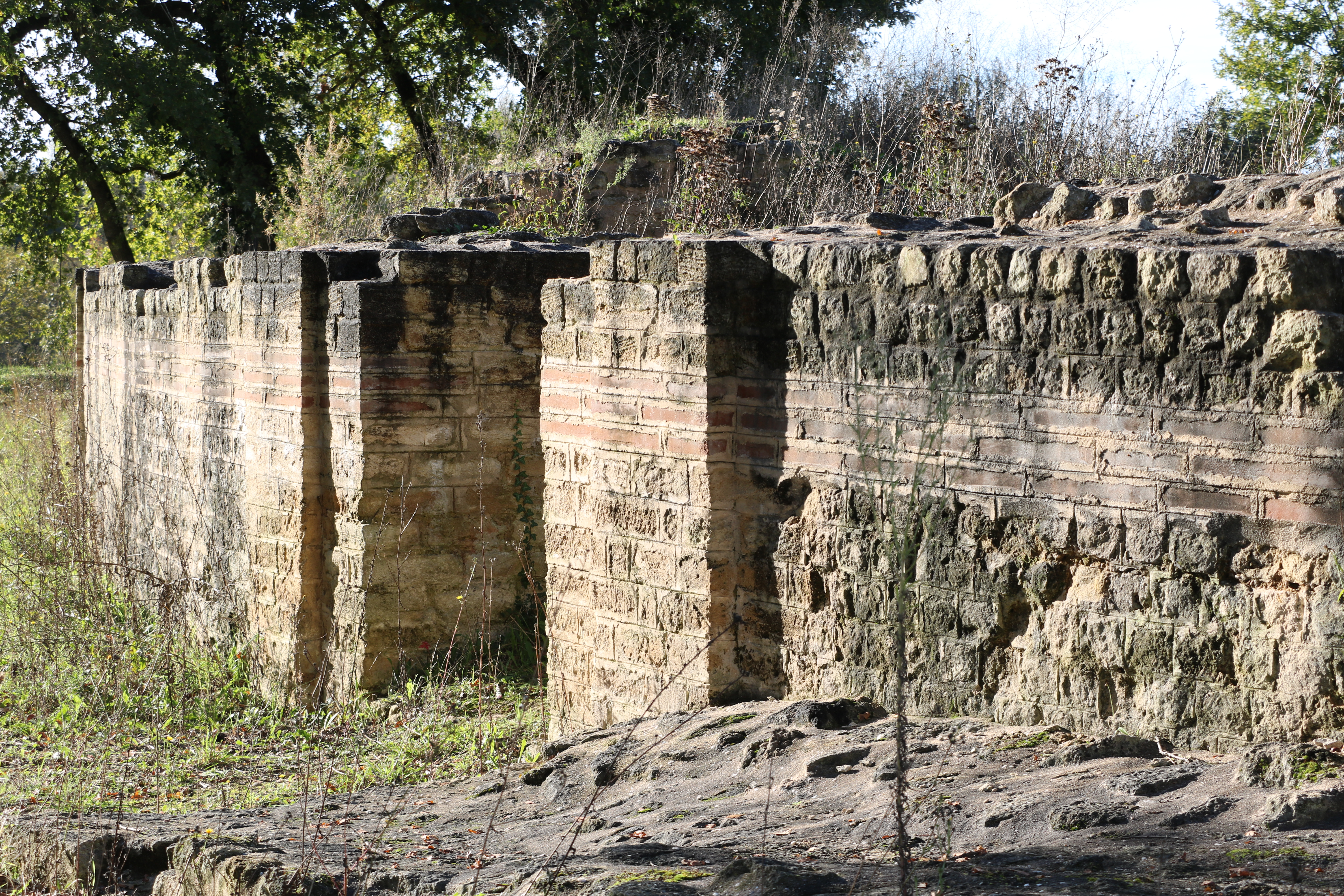 Vestiges du théâtre gallo-romain de Brion du Ier siècle, situé à Saint-Germain d'Esteuil en région Nouvelle-Aquitaine. Ils ont été réutilisés au XIVe siècle pour une maison fortifiée. Ils sont inscrits au titre des monuments historiques depuis 1984.